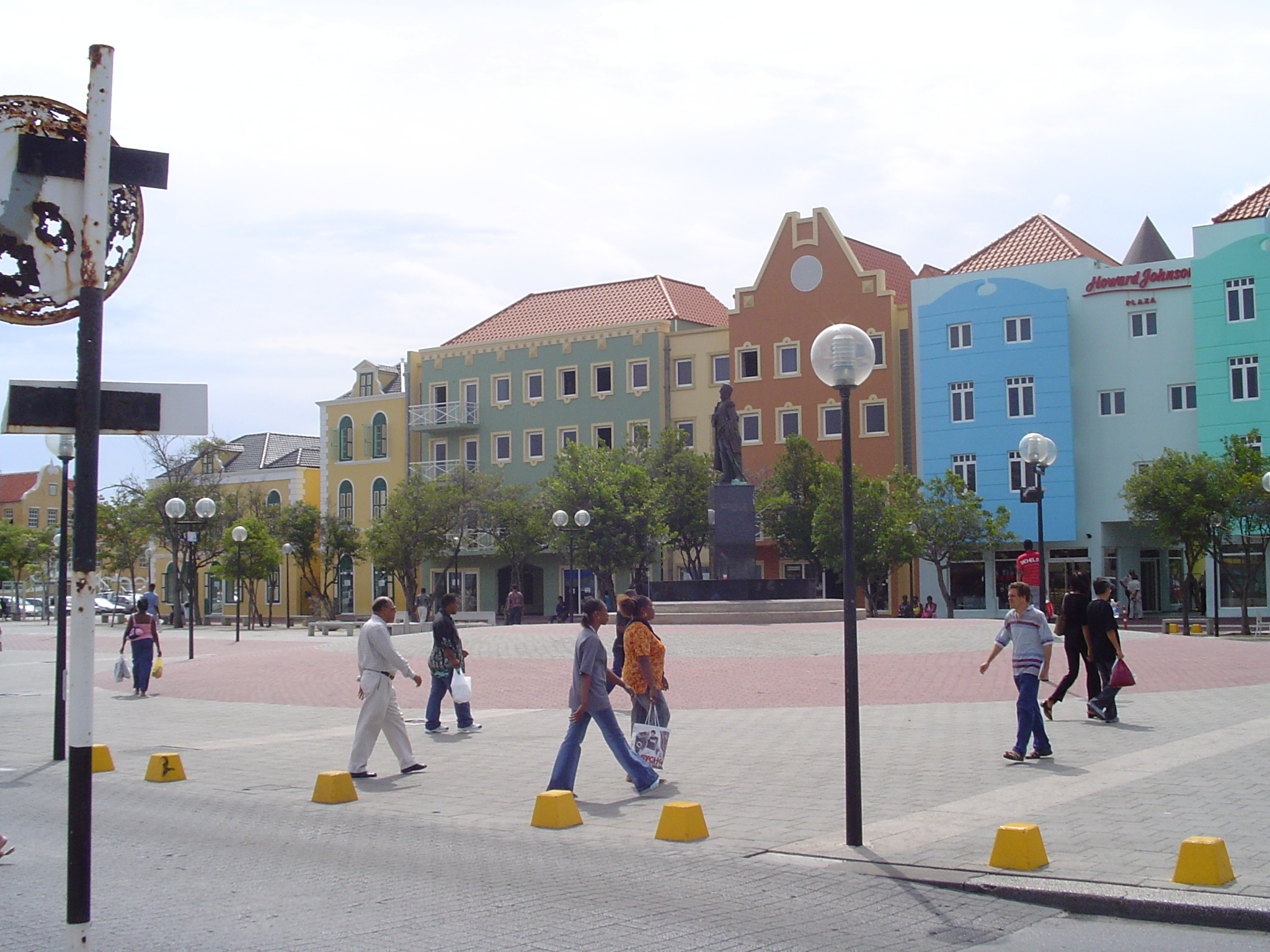 Dit is een foto van het Brionplein in Willemstad, Dat de naam draagt van Pédro Luis Brion -C.R.R.